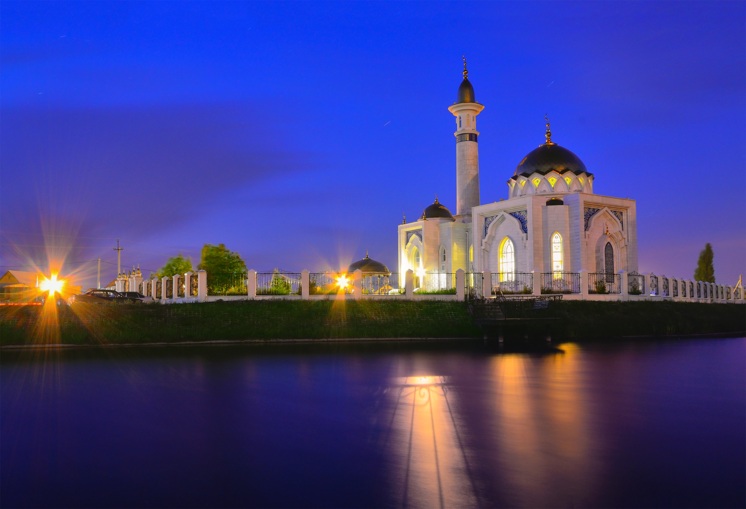 Мечеть "Суфия". Стерлитамакский район